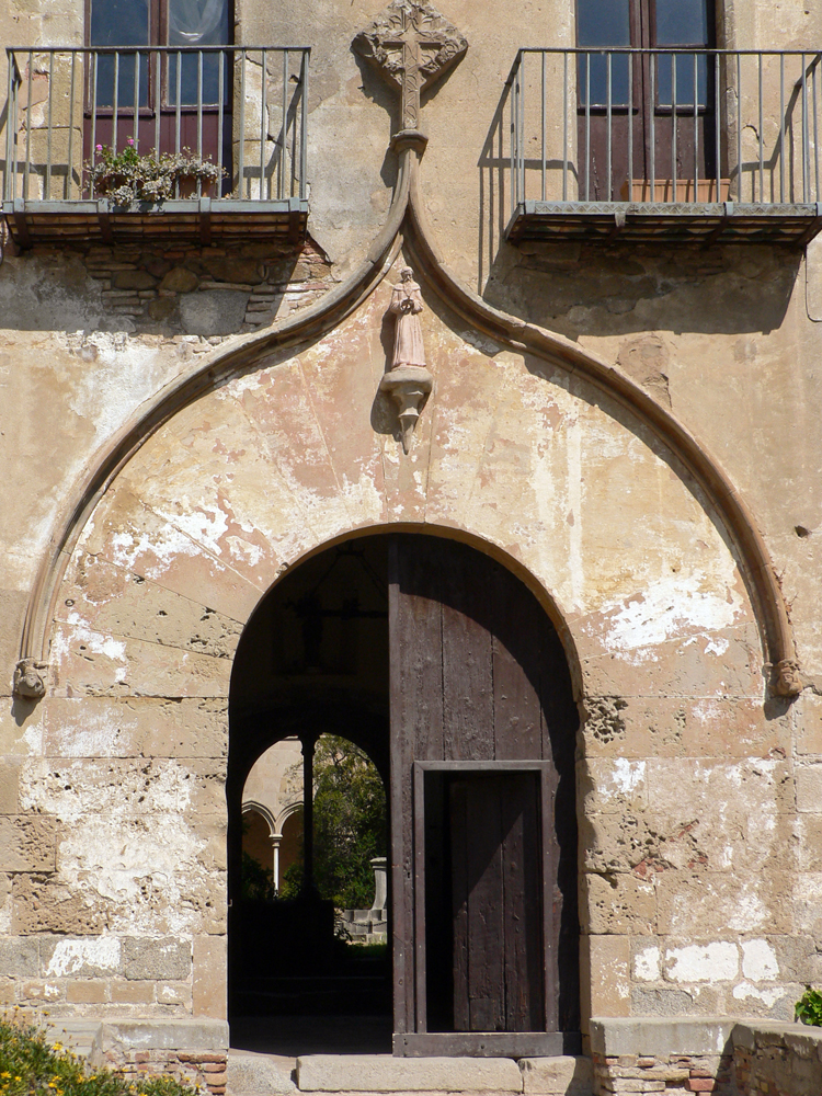 Porta gòtica de Sant Jeroni de la Murtra (Badalona).